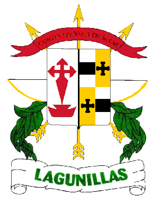 Escudo del municipio Sucre, estado Mérida, Venezuela